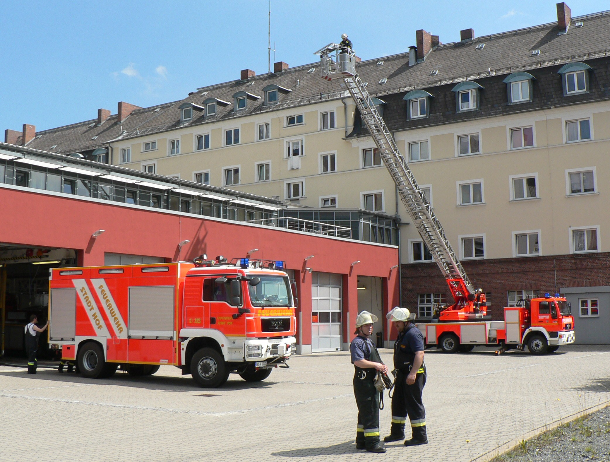 eigene Datei